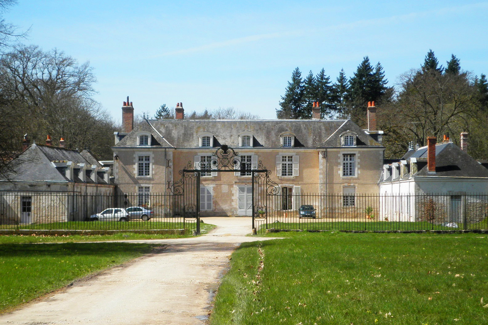 Château de Boisgibault situé à Ardon, dans le département du Loiret et la région Centre.